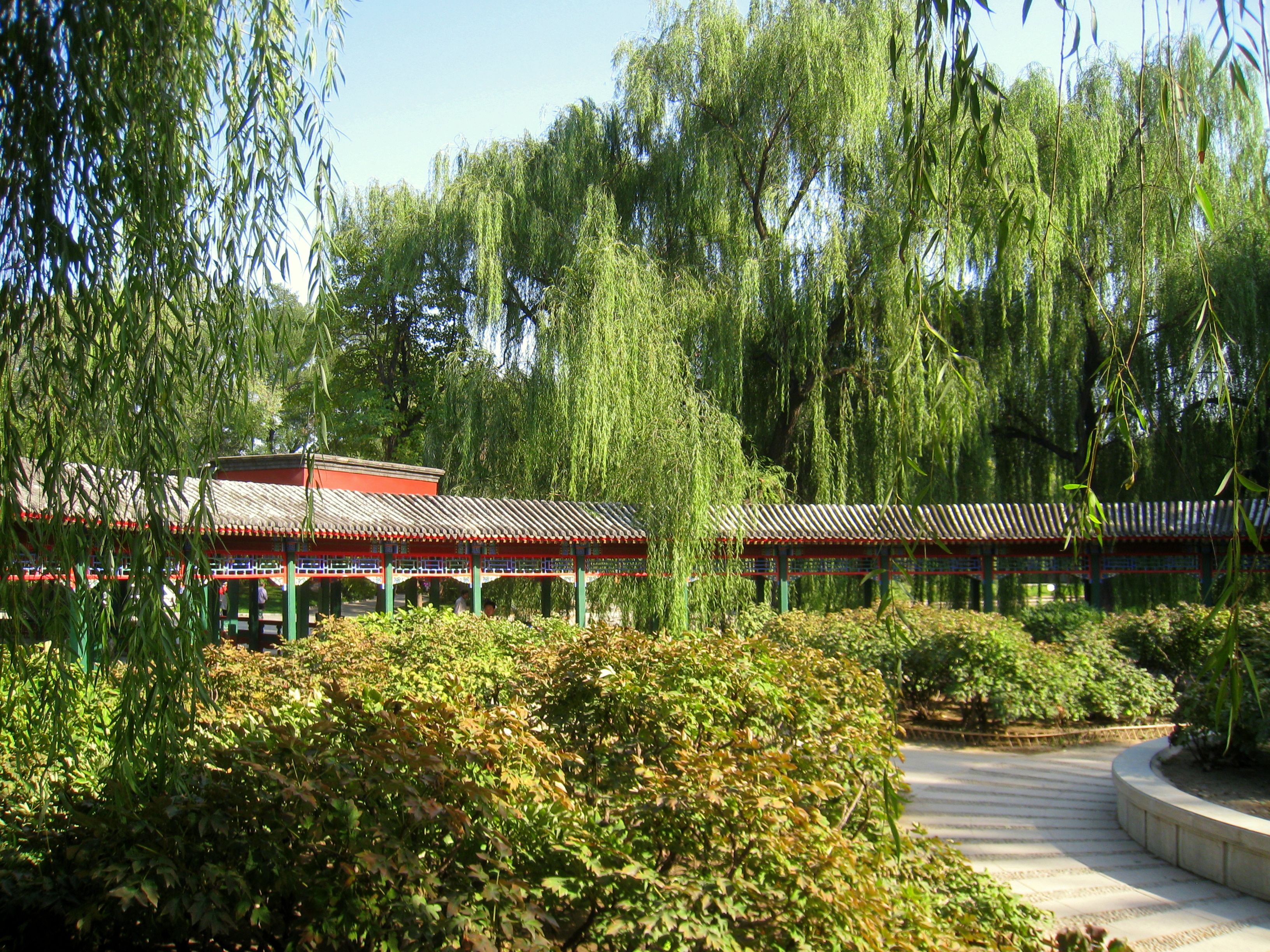 Beijing Zoo (北京动物园), Beijing, China.